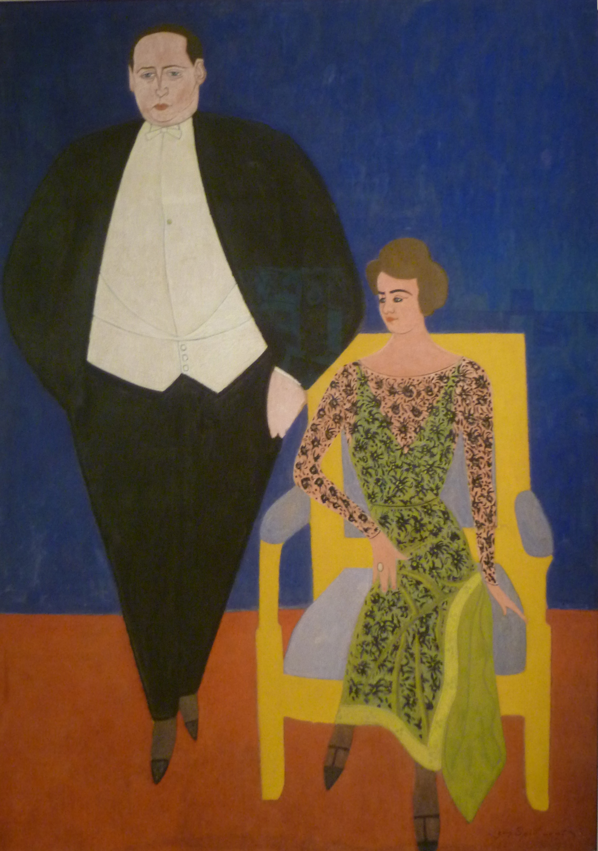 P.G. Van Hecke en Norine (1920); gouache, pastelkrijt in Oost-Indische inkt op karton; 170 x 120 cm; collectie Mu.Zee, Oostende